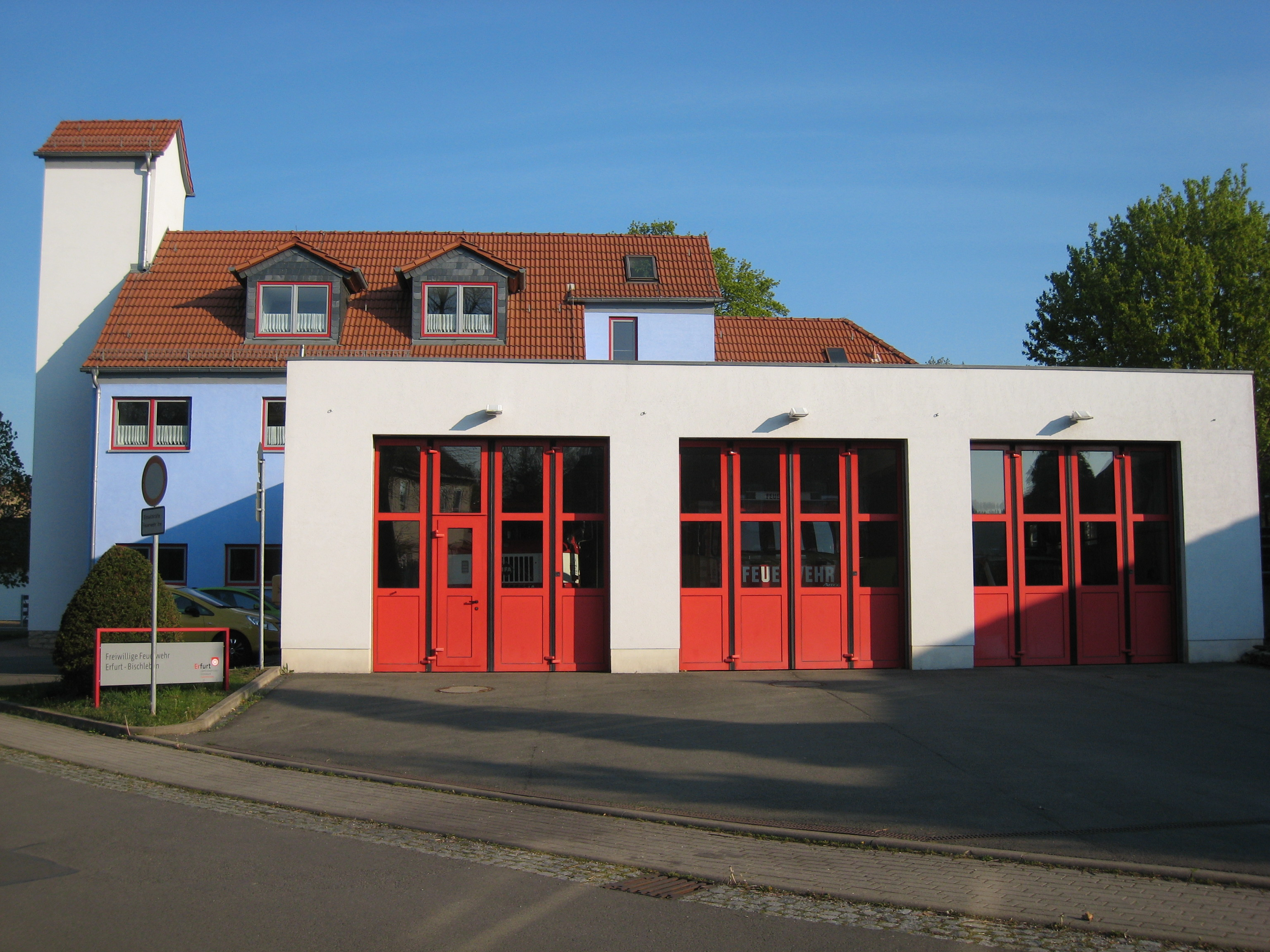 Die Feuerwache in Erfurt-Bischleben.